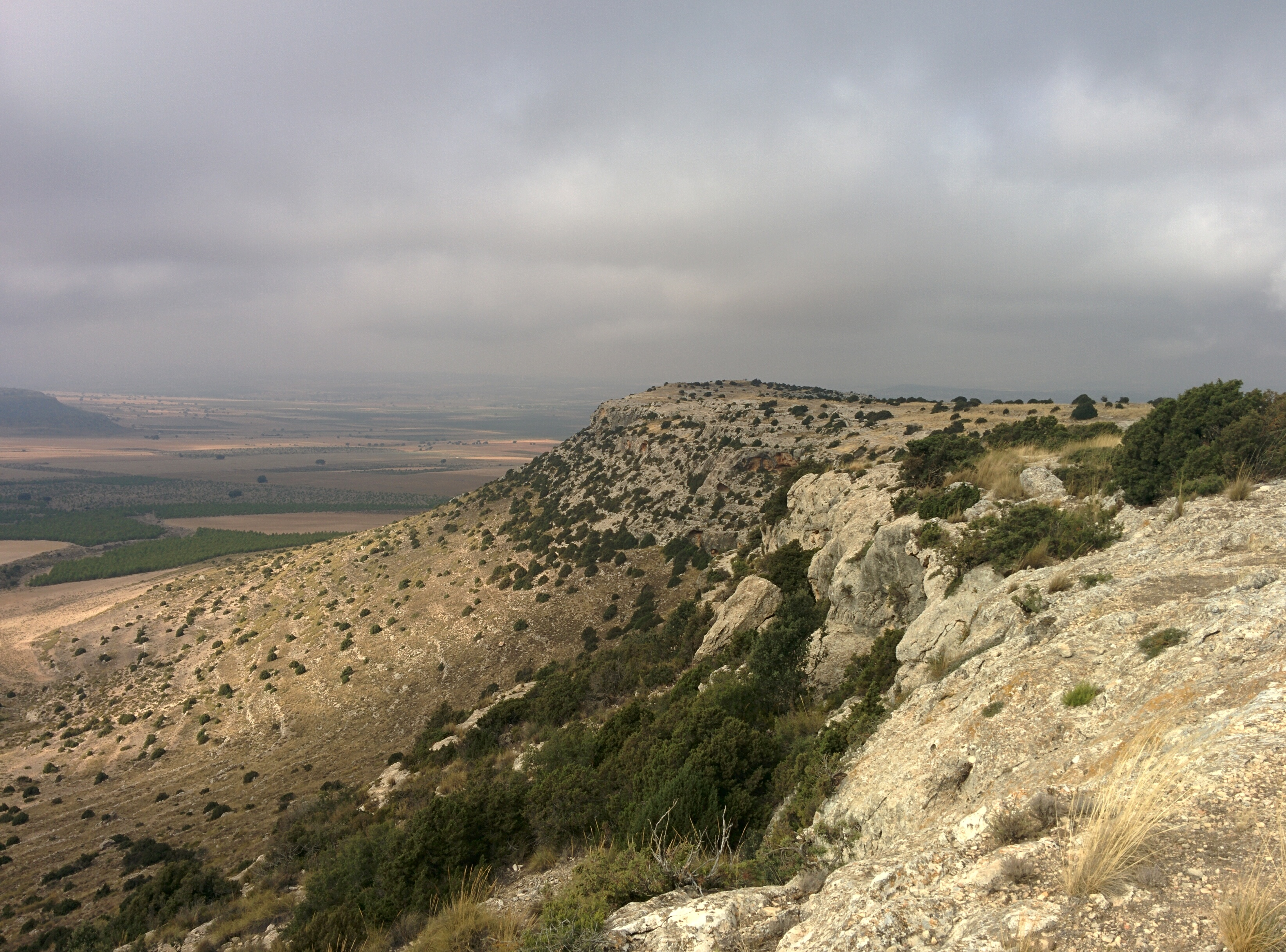 Poblado ibérico Castellar de Meca (Ayora, Valencia).